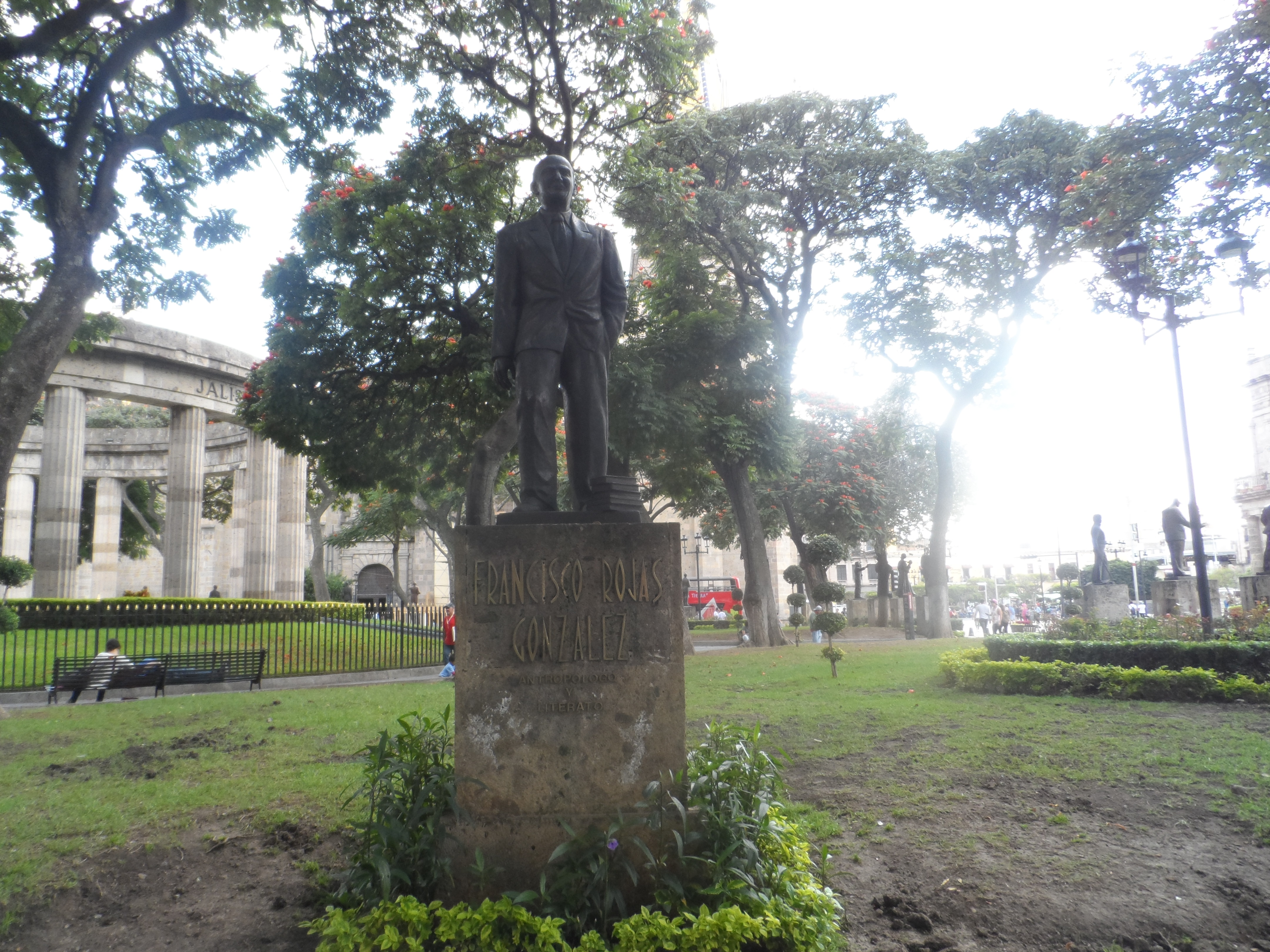 Estatua del escritor jalisciense Francisco Rojas González en la "Rotonda de los Jaliscienses Ilustres".